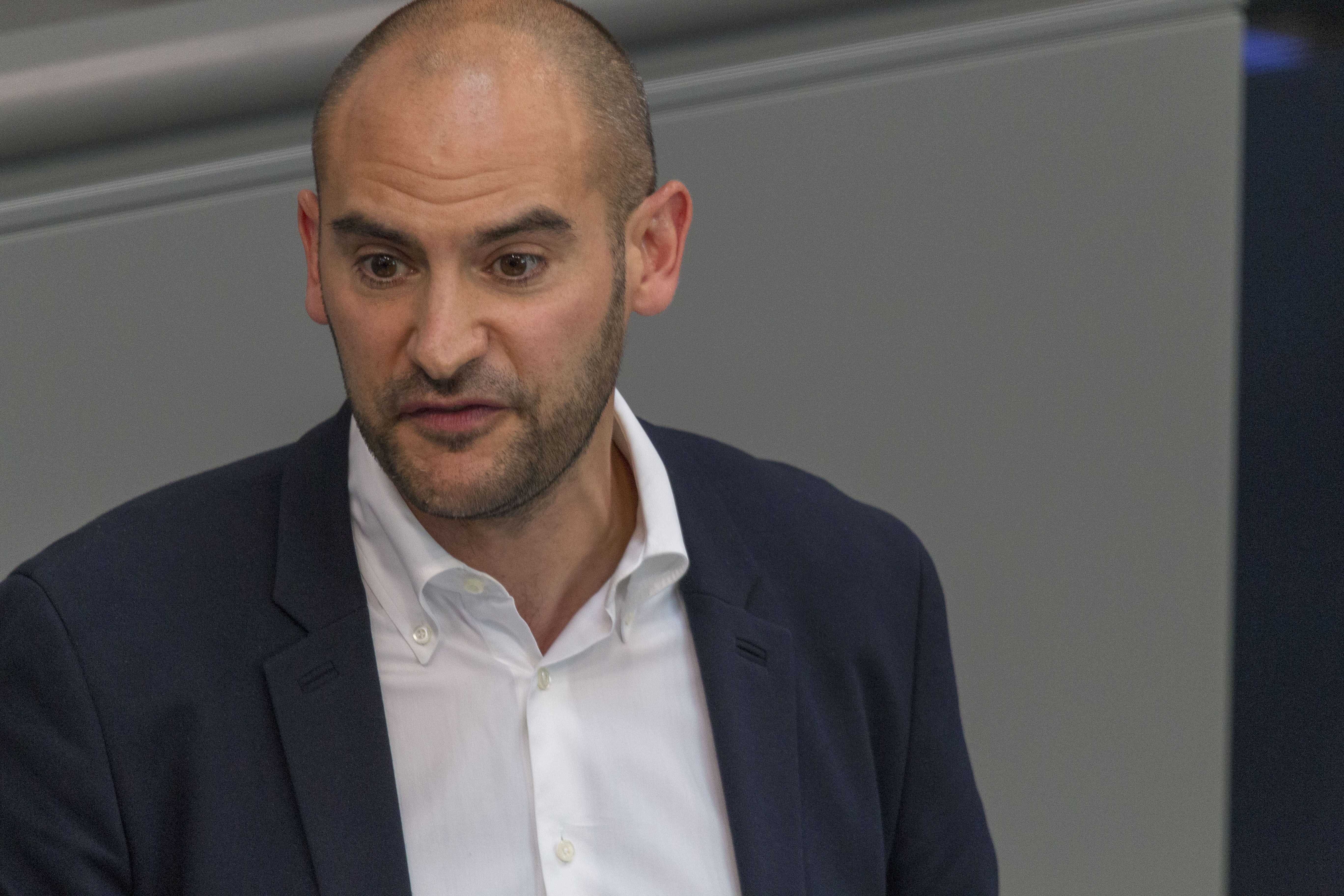 Danyal Bayaz, Bundestagsabgeordneter der GRÜNEN während der Plenarsitzung des Deutschen Bundestages am 2. Juli 2020 in Berlin.